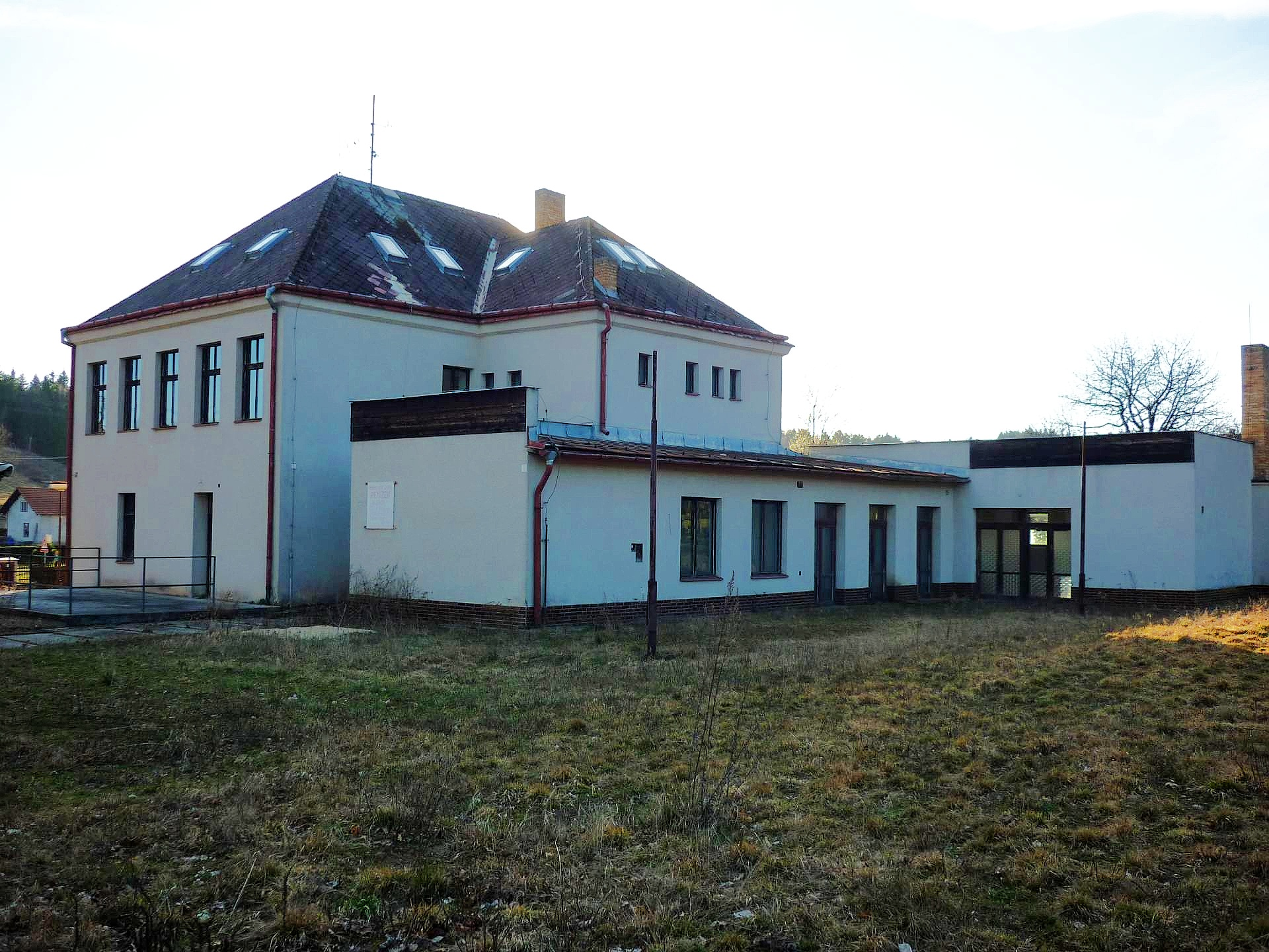 Valtínovské budovy a památky - budova bývalé školy